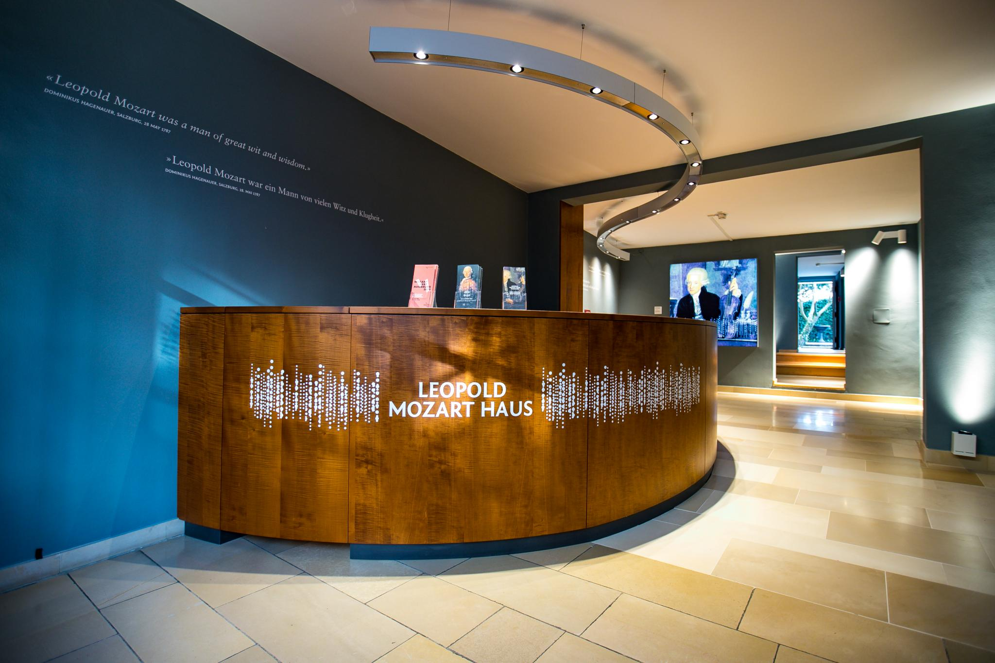 Das neu gestaltete Foyer im Leopold-Mozart-Haus Augsburg